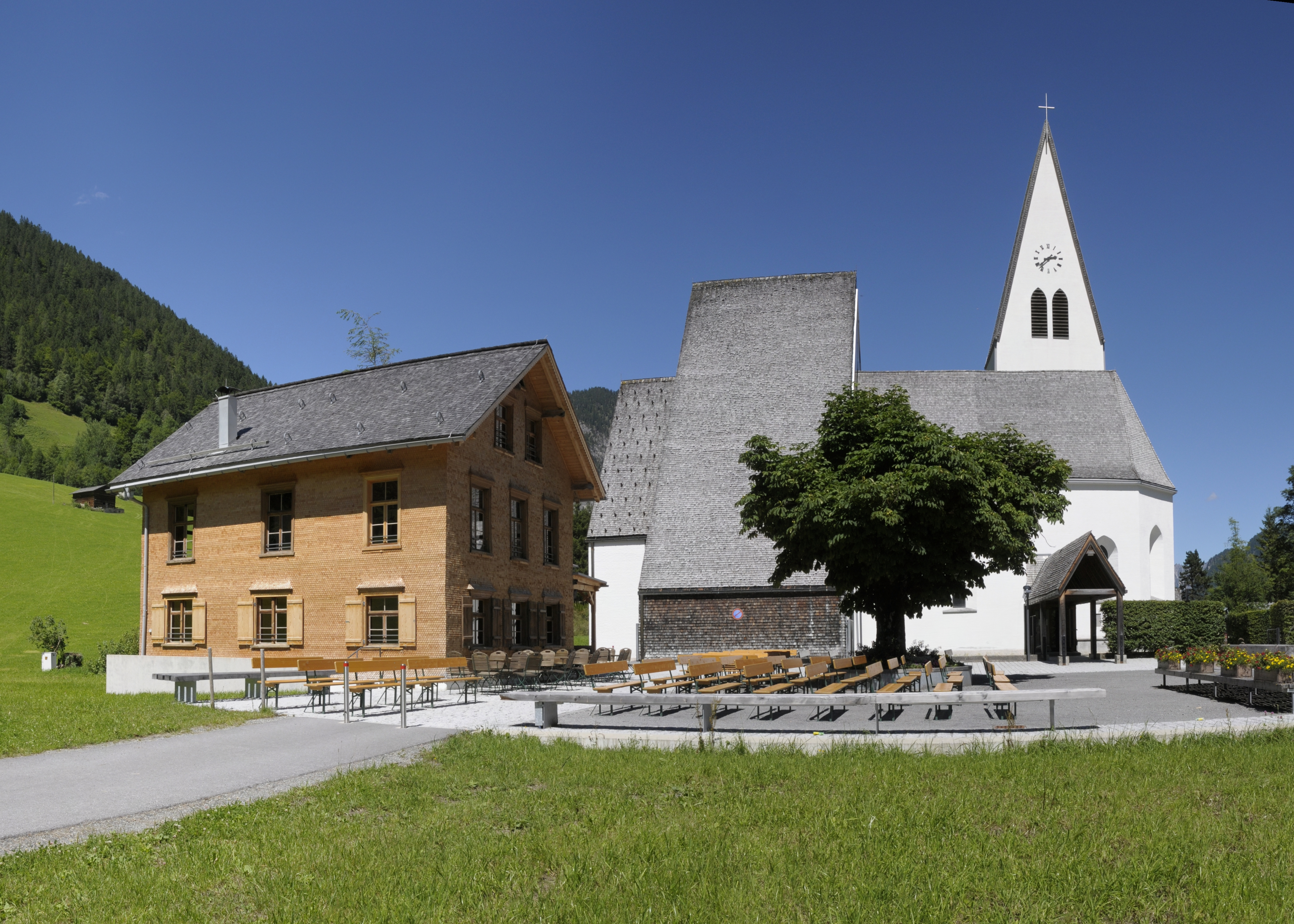 Panorama mit mehreren Bilder. Pfarrkirche Mariä Himmelfahrt in Brand.